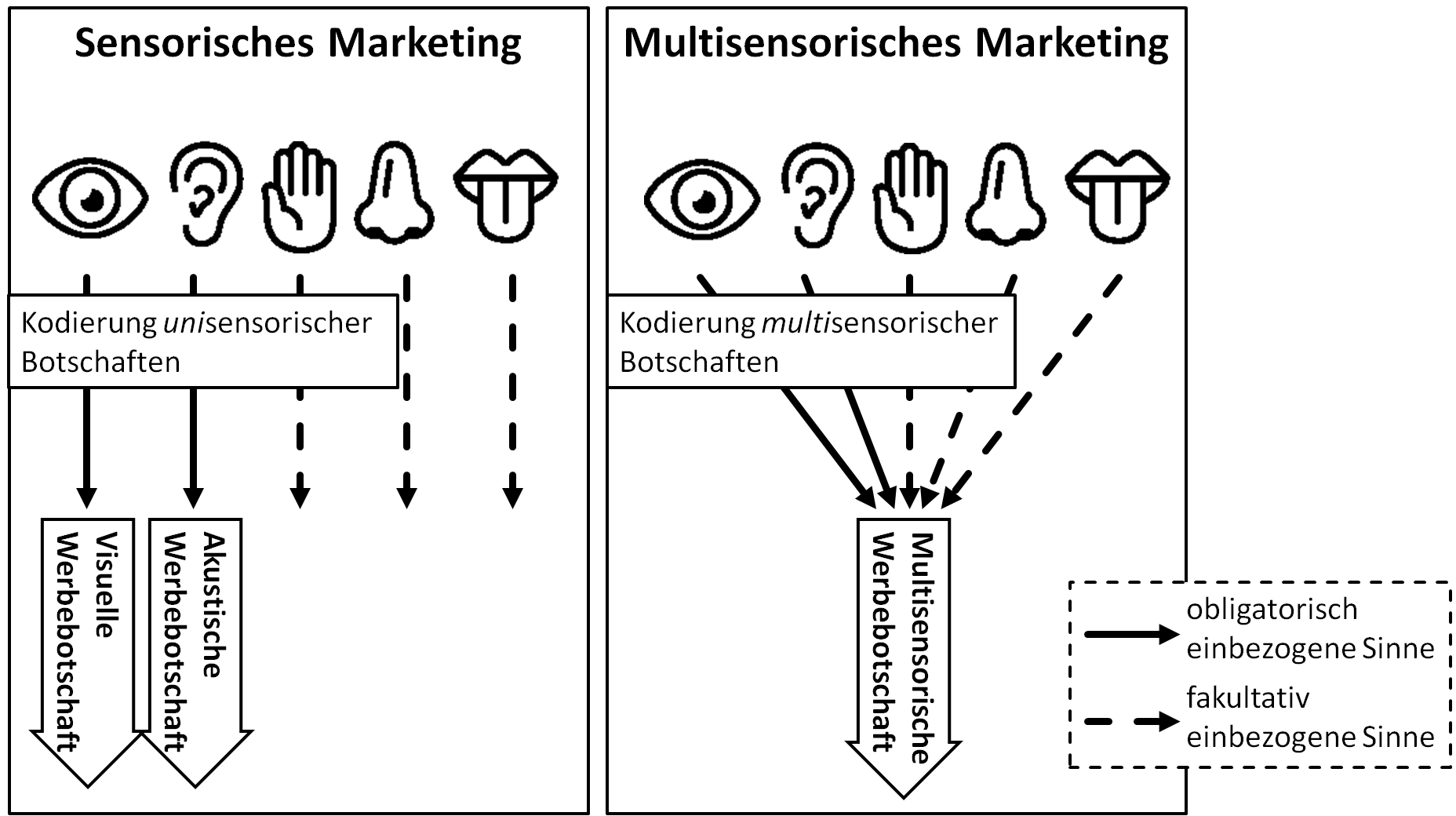 Abgrenzung von sensorischem und multisensorischem Marketing